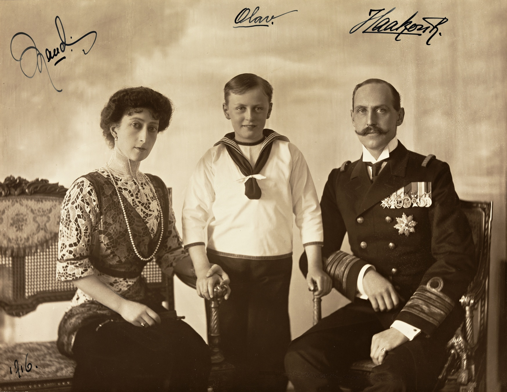 Tittel / Title: Portrett av Dronning Maud, Kronprins Olav og Kong Haakon VII Dato / Date: ca 1910 Fotograf / Photographer: Ernest Rude (1871-1948) Sted / Place: Oslo Eier / Owner Institution: Nasjonalbiblioteket / National Library of Norway Lenke / Link: Bildesignatur / Image Number: blds_04778